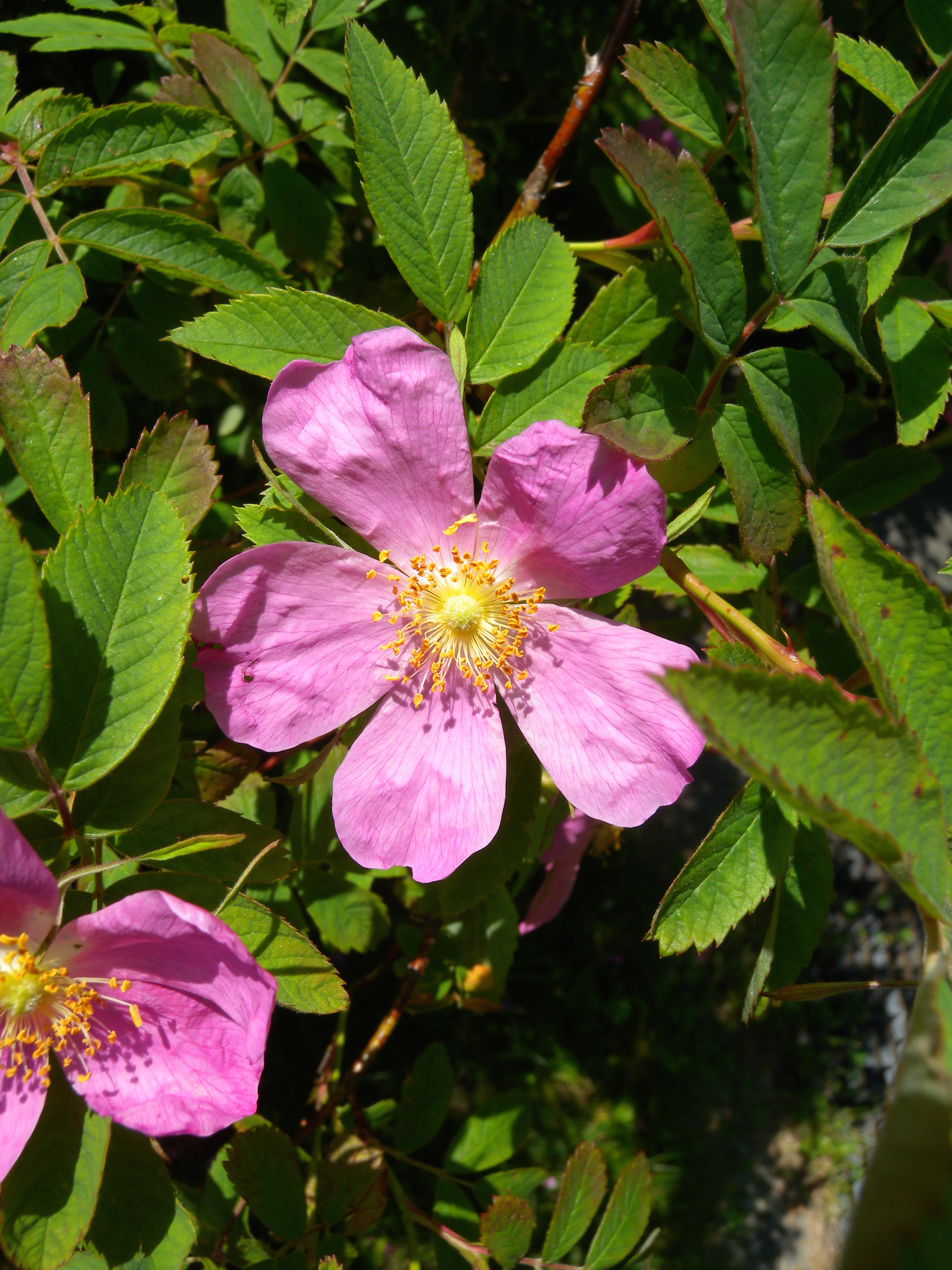 Blüte der Zimt-Rose (Rosa majalis, Rosaceae); Garten in Bern, Schweiz